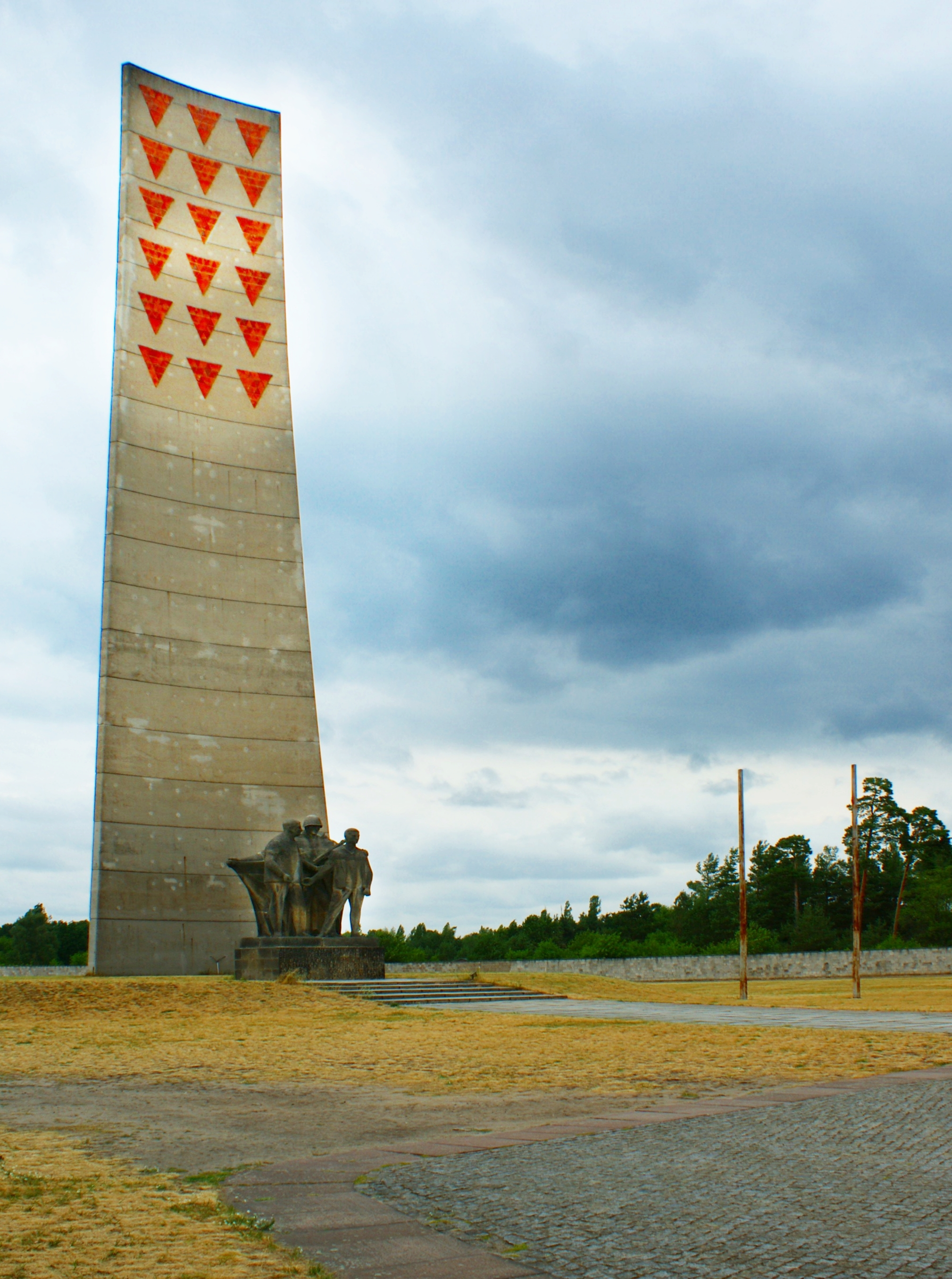 zentrales Mahnmal auf dem Gelände des KZ Sachsenhausen